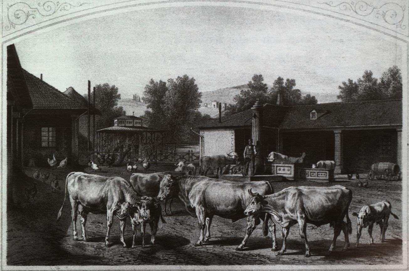 Ehemalige Meierei von Schloß Rosenstein in Stuttgart ((Baujahr 1833-1840), heute Betriebshof der Wilhelma. Lithographie von Julius Schnorr von Carolsfeld und Anton Braith, um 1865. Blick nach Westen in den Hof, links und rechts: die beiden Flügelbauten der Meierei, Mitte hinten: Hühnerhauspavillon von Ludwig von Zanth (Baujahr 1855). Nach den Zerstörungen des Zweiten Weltkriegs blieb nur der nördliche Flügel erhalten.